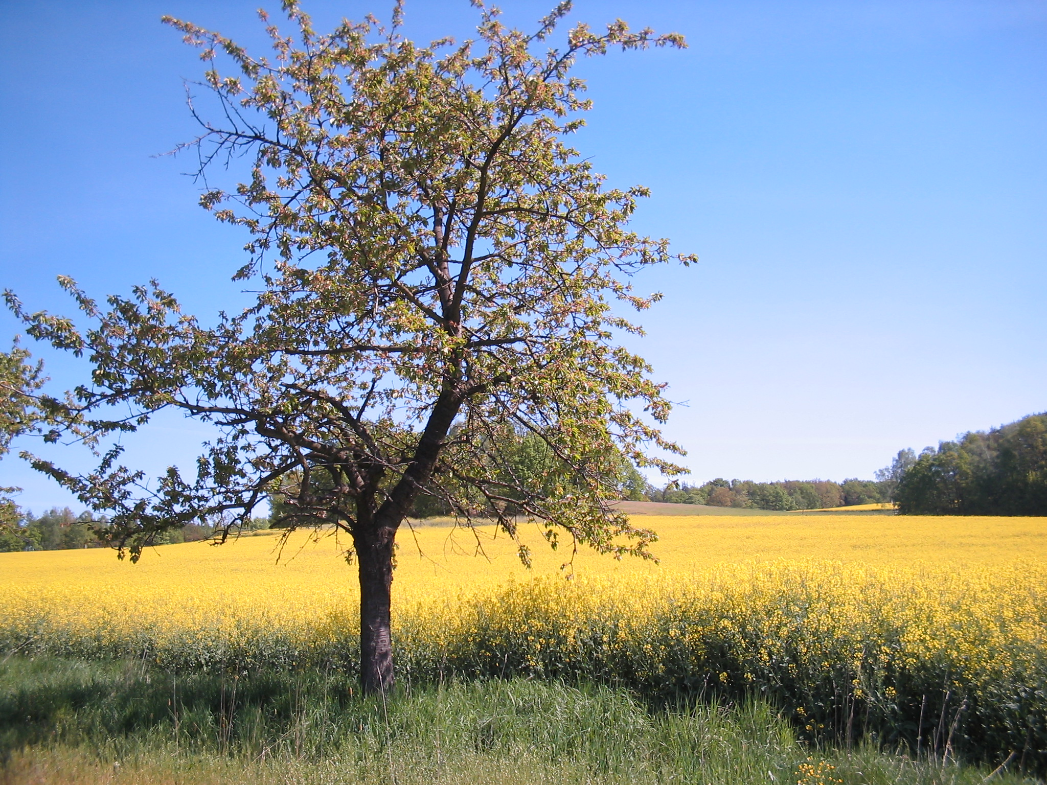 Rapsfeld in der Sächsischen Schweiz